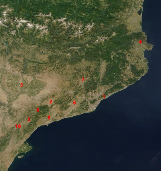 Distribució de les Denominacions d'Origen a Catalunya 1 DO Alella 2 DO Conca de Barberà 3 DO Costers del Segre 4 DO Empordà 5 DO Montsant 6 DO Penedès 7 DO Pla de Bages 8 DOQ Priorat 9 DO Tarragona 10 DO Terra Alta